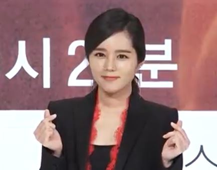 OCN 오리지널 드라마 미스트리스 제작발표회 한가인